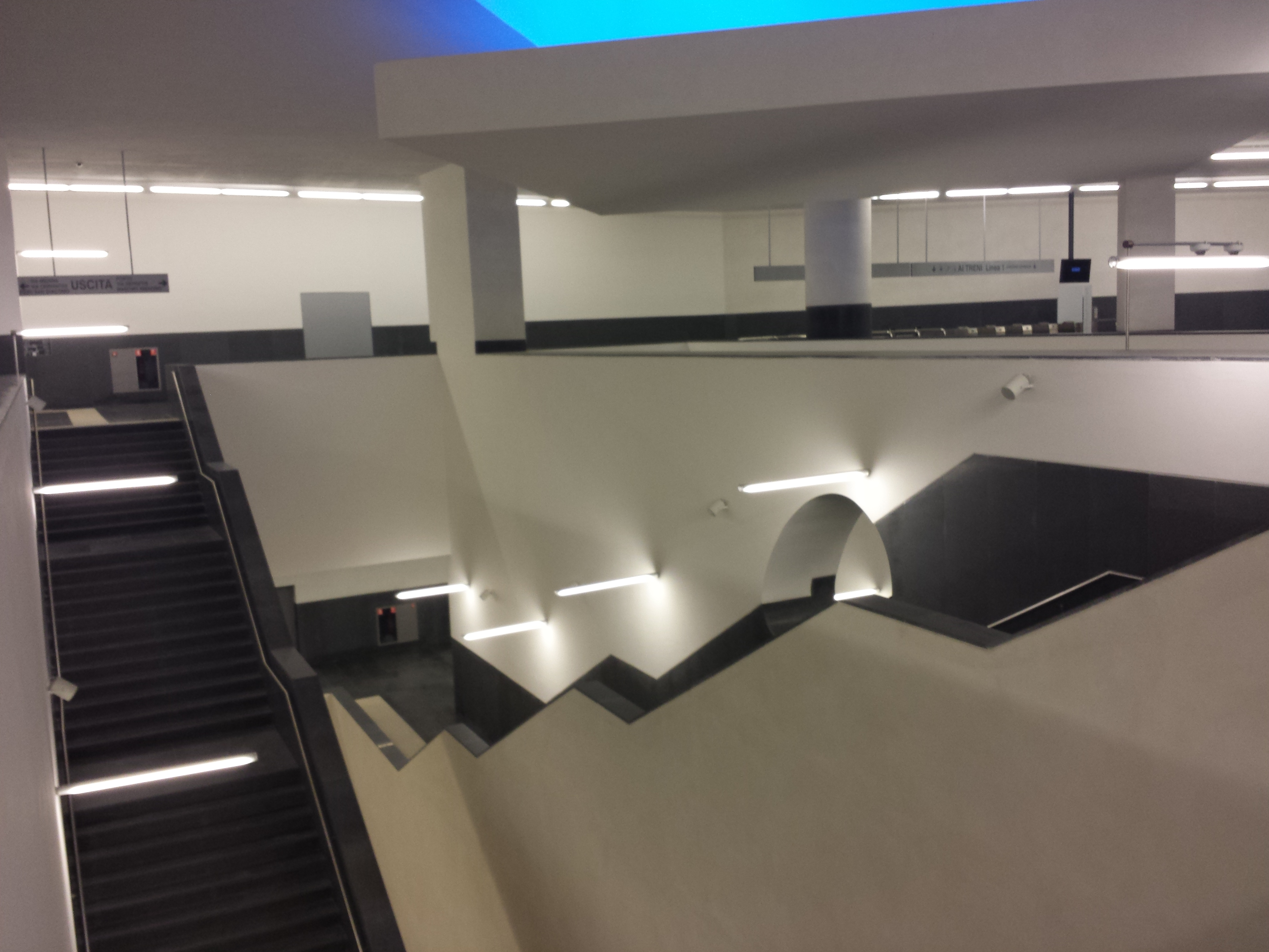 Il pozzo della stazione Municipio della linea 1 della metropolitana di Napoli